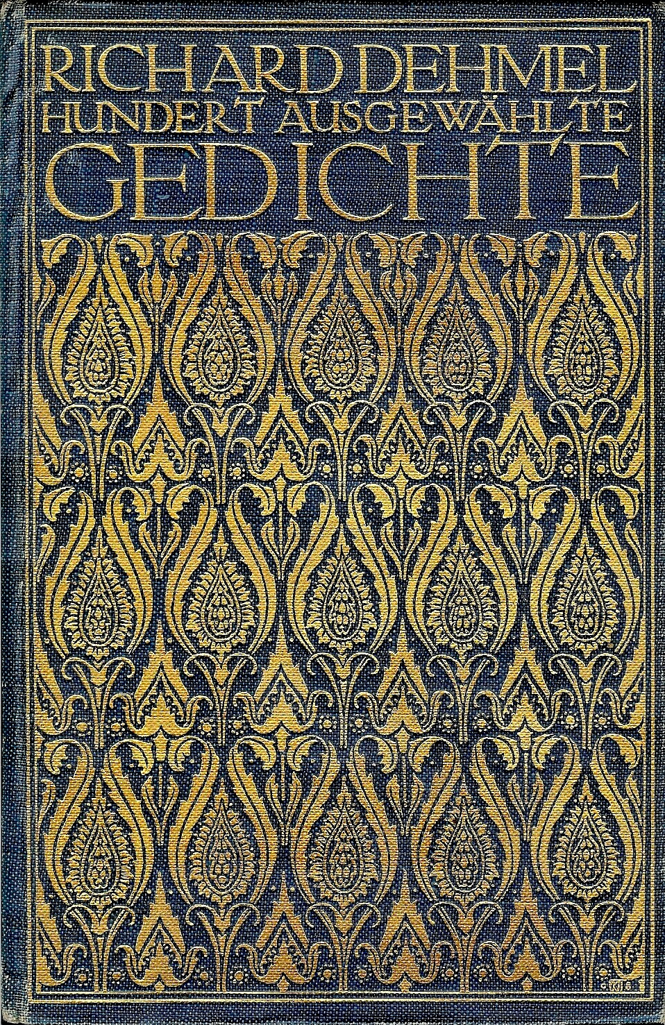 Richard Dehmel - Hundert ausgewähle Gedichte, Berlin, 1909